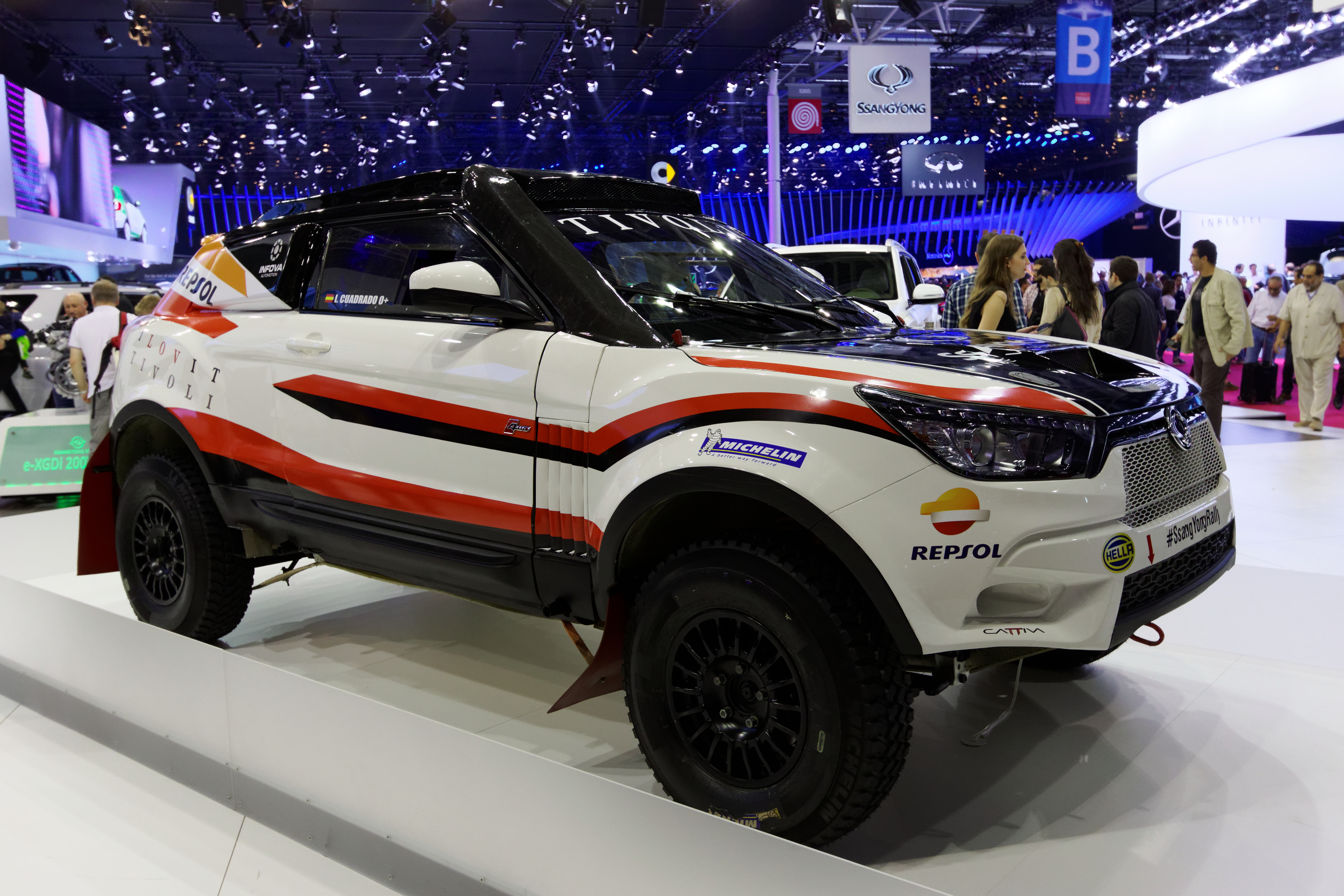 Une SsangYong Tivoli rally raid présentée lors du mondial de l'automobile de Paris 2016.